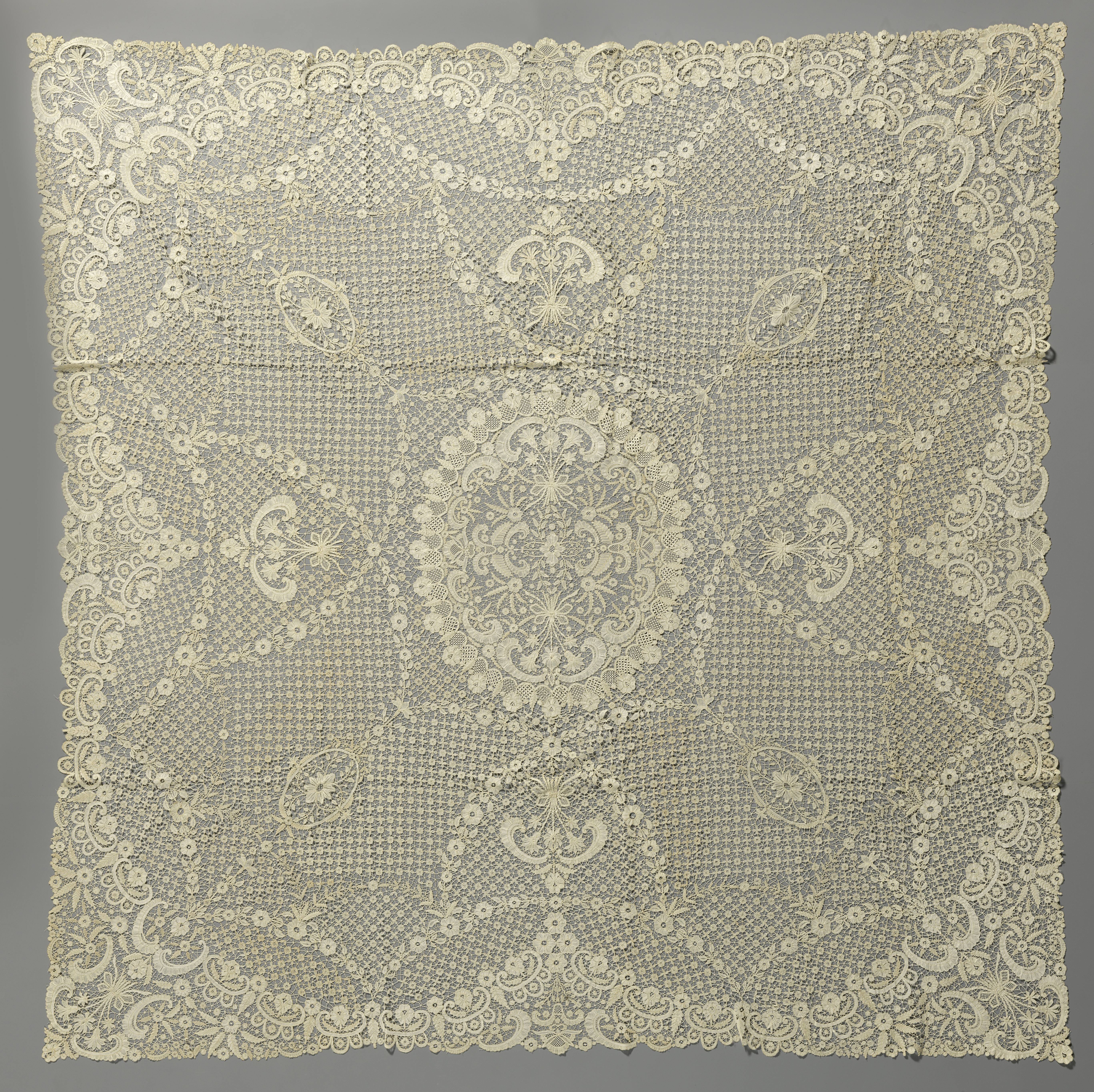 IdentificatieTitel(s): Sprei van gemengde kant met veldbloemenObjecttype: sprei Objectnummer: BK-BR-J-386Omschrijving: Sprei van naturelkleurige gemengde kant - kloskant in combinatie met naaldkant - Brusselse duchesse. Een ondergrond van vlechten is bezaaid met boterbloempjes en klavertjes van vier, Waar: op een fors patroon staat, dat ten opzichte van twee assen symmetrisch is. Het midden draagt een groot ovaal medaillon met getande omtrek, waarop beurtelings een klaproosje en een korenaar staat. Het hart vertoont onder andere twee toefjes van met strik gebonden korenbloemen, korenaren en een rand van c-voluten. Hierbuiten staan een grote reserve van een gelobde vierpas, omrand door c-voluten, waarbuiten toefjes korenaren en korenbloemen. Grote cirkelbogen, gevormd door aan een stengel geregen klaproosjes, oversnijden elkaar in de vierpas. Hiertussen zijn vier korenbloemtoefjes en vier ovaaltjes kruisgewijs geplaatst.VervaardigingVervaardiger: ontwerper: J.M. van der Rooskantschool: Koninklijke Kantwerkschool 'Koningin Sophie der Nederlanden'Plaats vervaardiging: SluisDatering: ca. 1918 - ca. 1920Fysieke kenmerken: gemengde kant, vlechtengrond met picotsMateriaal: linnen Techniek: gemengde kant / Brusselse duchesse / gaaskantgrond (naaldkant) / vlechtengrond (kloskant)Afmetingen: h 210 cm. × b 212 cm. ToelichtingGeschenk van Koningin Wilhelmina aan de Koningin-Moeder.Verwerving en rechtenCredit line: Bruikleen van de Stichting Historische Verzamelingen van het Huis Oranje-NassauVerwerving: bruikleen 1965Copyright: Pubkiek domein